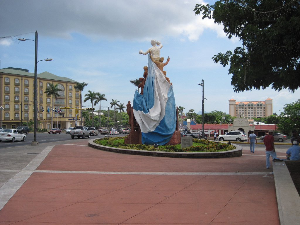 Plaza las Victorias ubicada en el Nuevo centro de Managua